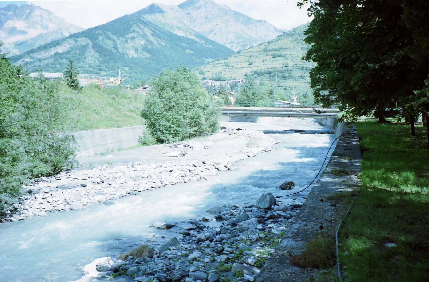 La Dora di Bardonecchia all'uscita del territorio comunale di Bardonecchia